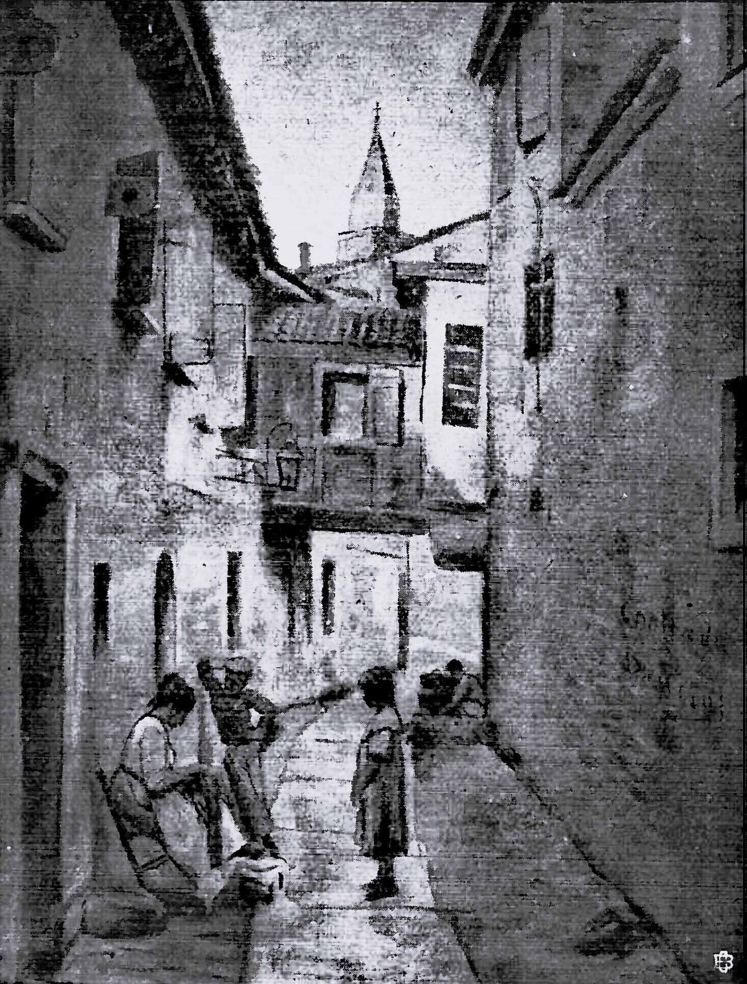 Straße in Capodistria. Gemälde von v. Lütgendorff.